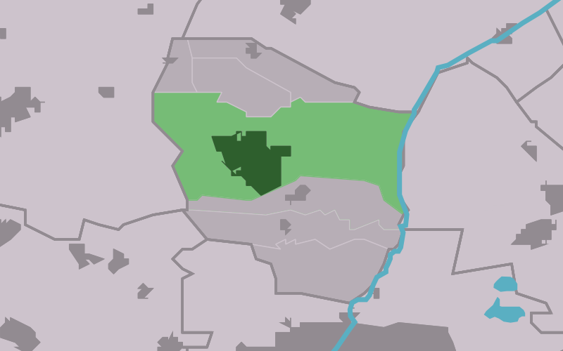 Kaartsje fan himrik fan Stiens